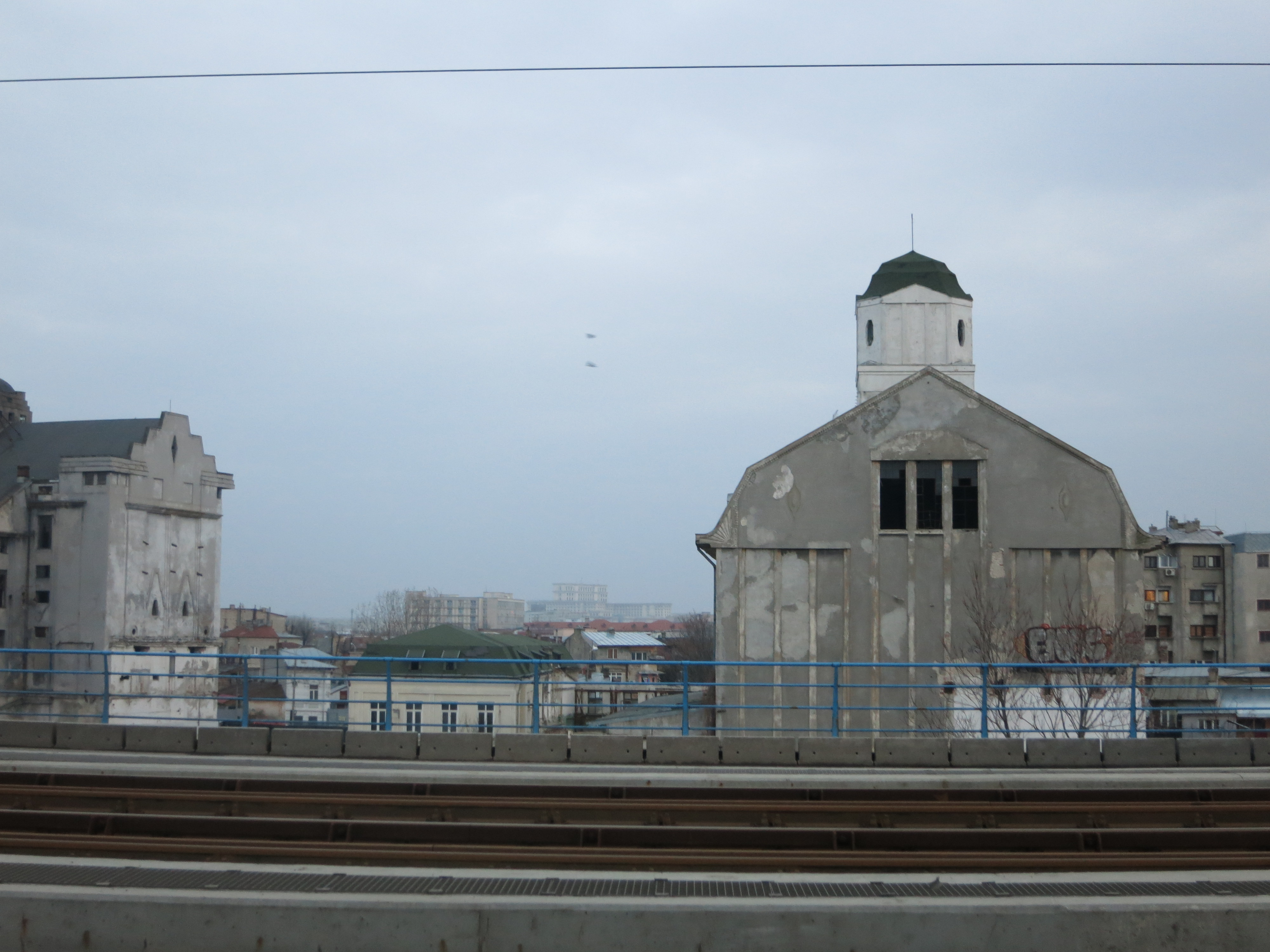 Fabrica de bere - Luther, municipiul București Șos. Orhideelor 46 sector 1 1869